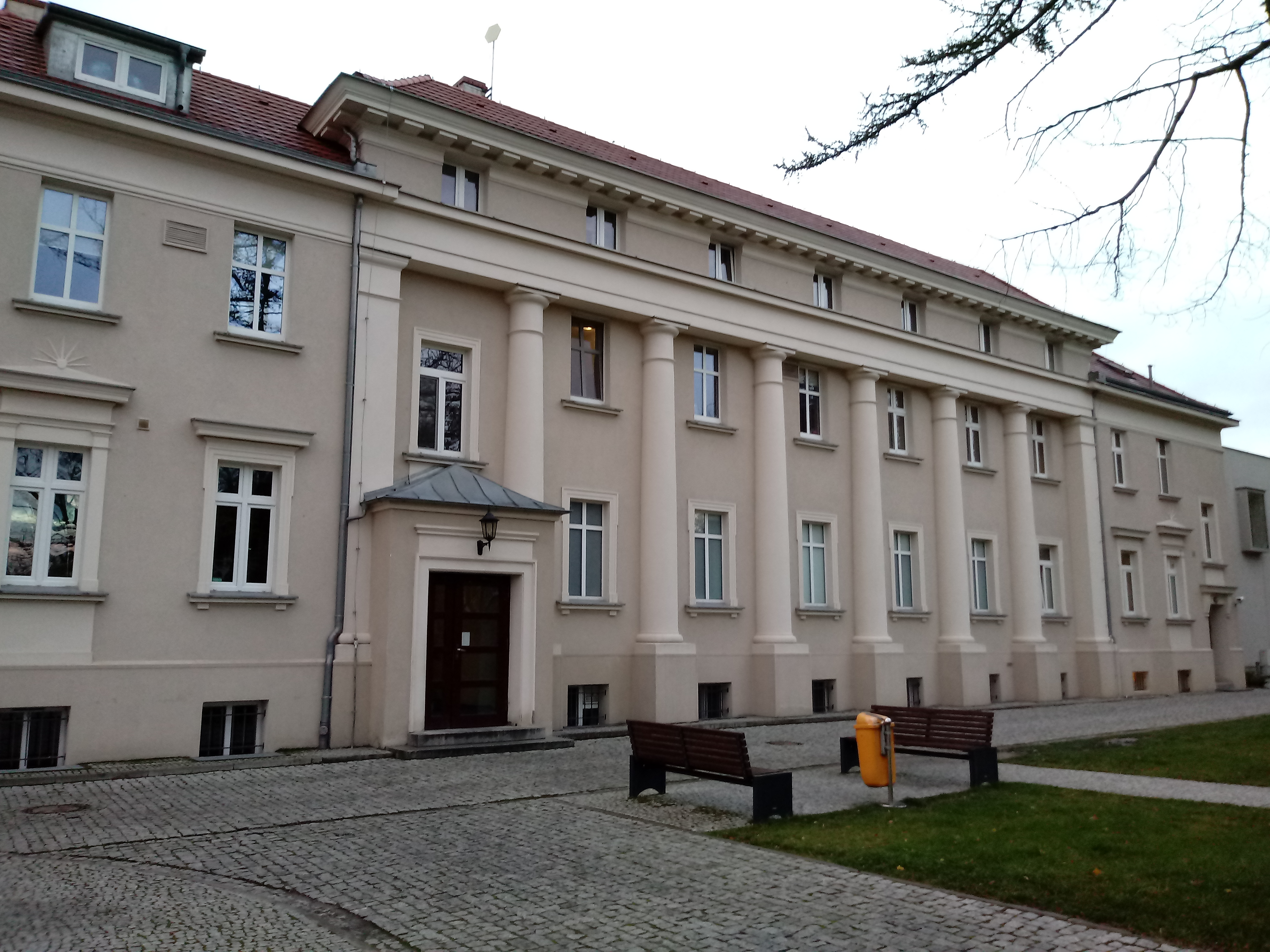 Budynek klasztoru Karmelitanek Bosych; Szpital Św. Rodziny, ul. Jarochowskiego, Poznań - Łazarz.